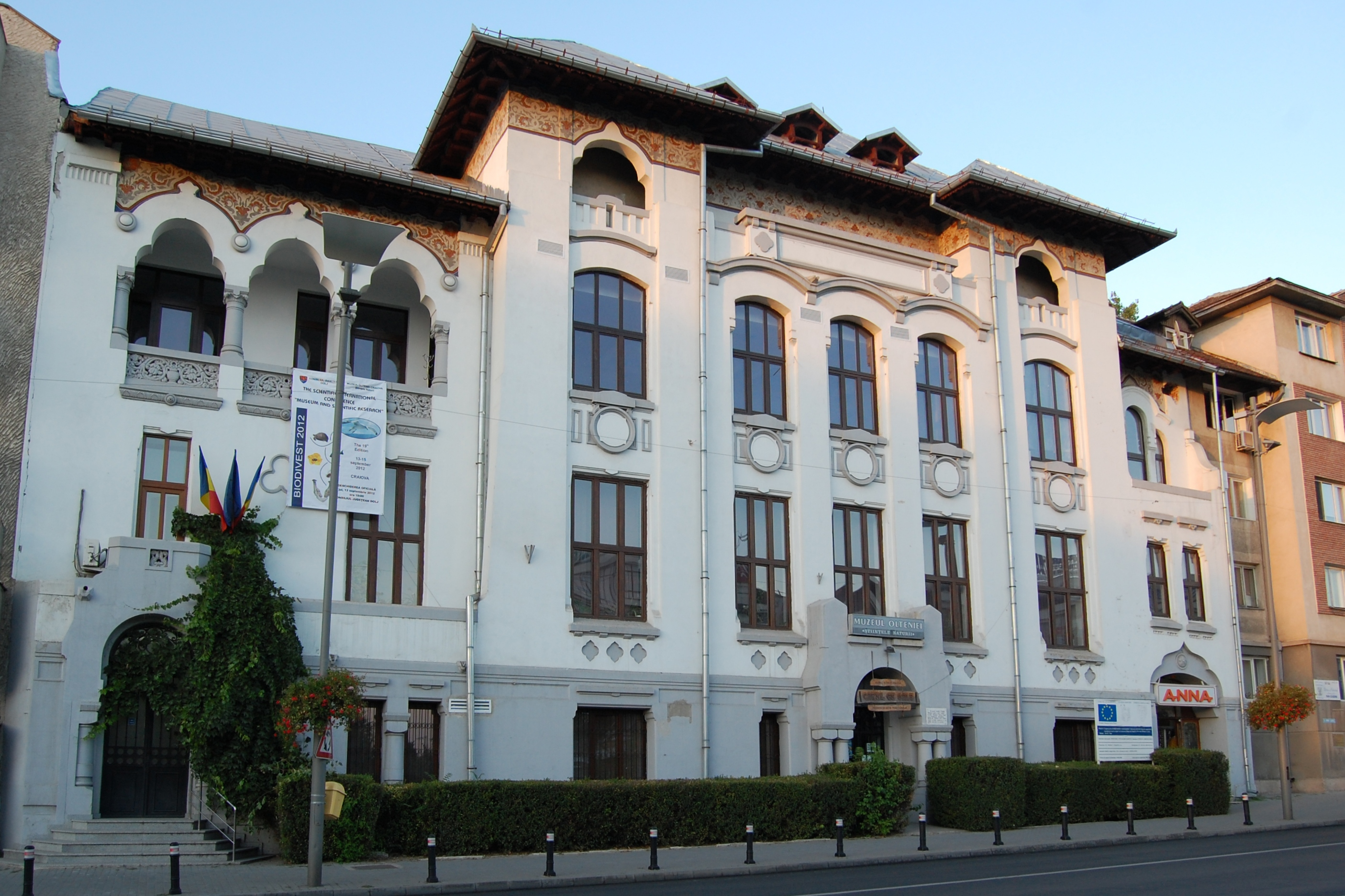 Str. Popa Șapcă 4